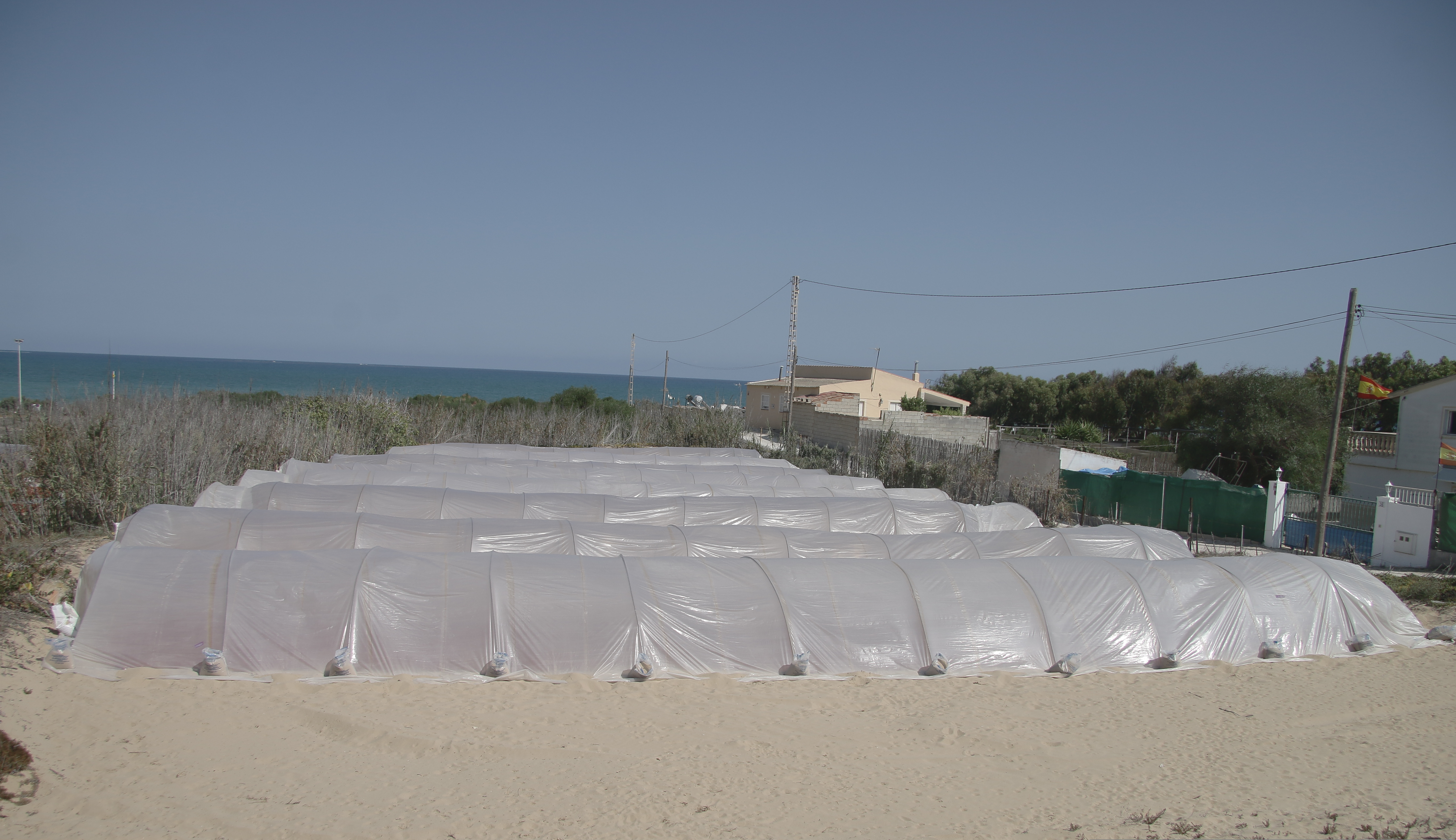 Túneles de secado de la ñora en Guardamar próximos al mar